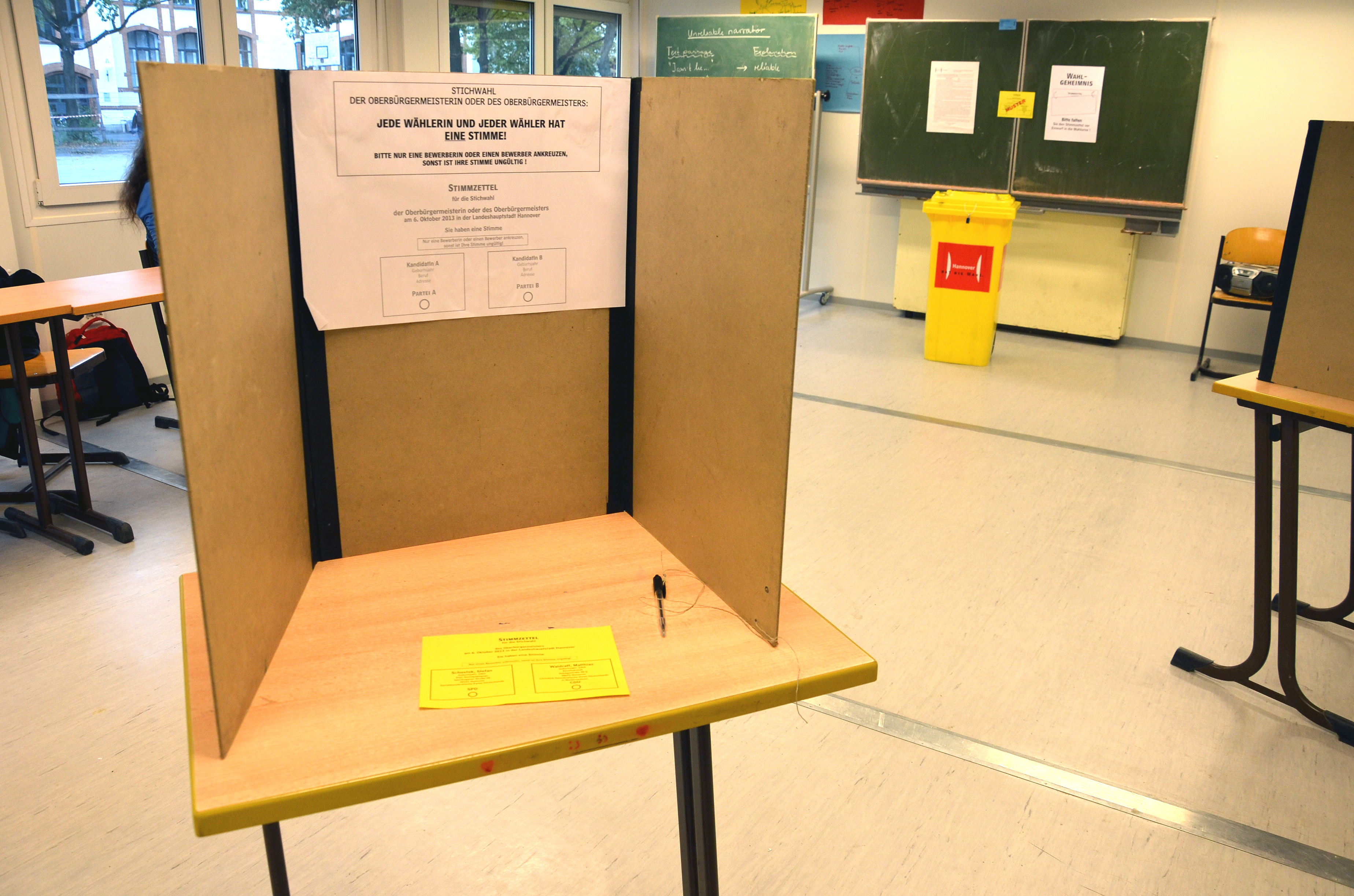 Zur Stichwahl für die Wahl des Oberbürgermeisters von Hannover hatten die BürgerInnen der Stadt die Wahl zwischen Stefan Schostok (SPD), der im ersten Wahlgang zwei Wochen zuvor 48,9 Prozent aller abgegebenen und gültigen Stimmen erhalten hatte, sowie Matthias Waldraff (CDU), der zuvor 33,8 Prozent erhalten hatte ...